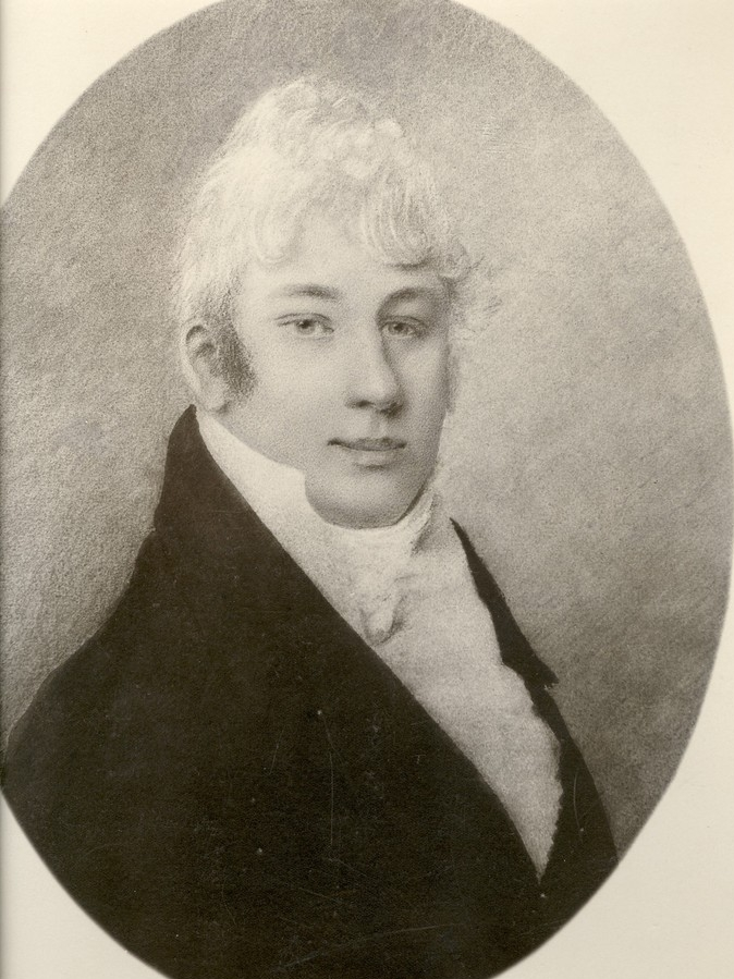 Portrait of Reinhold von Stackelberg (1777—1863)